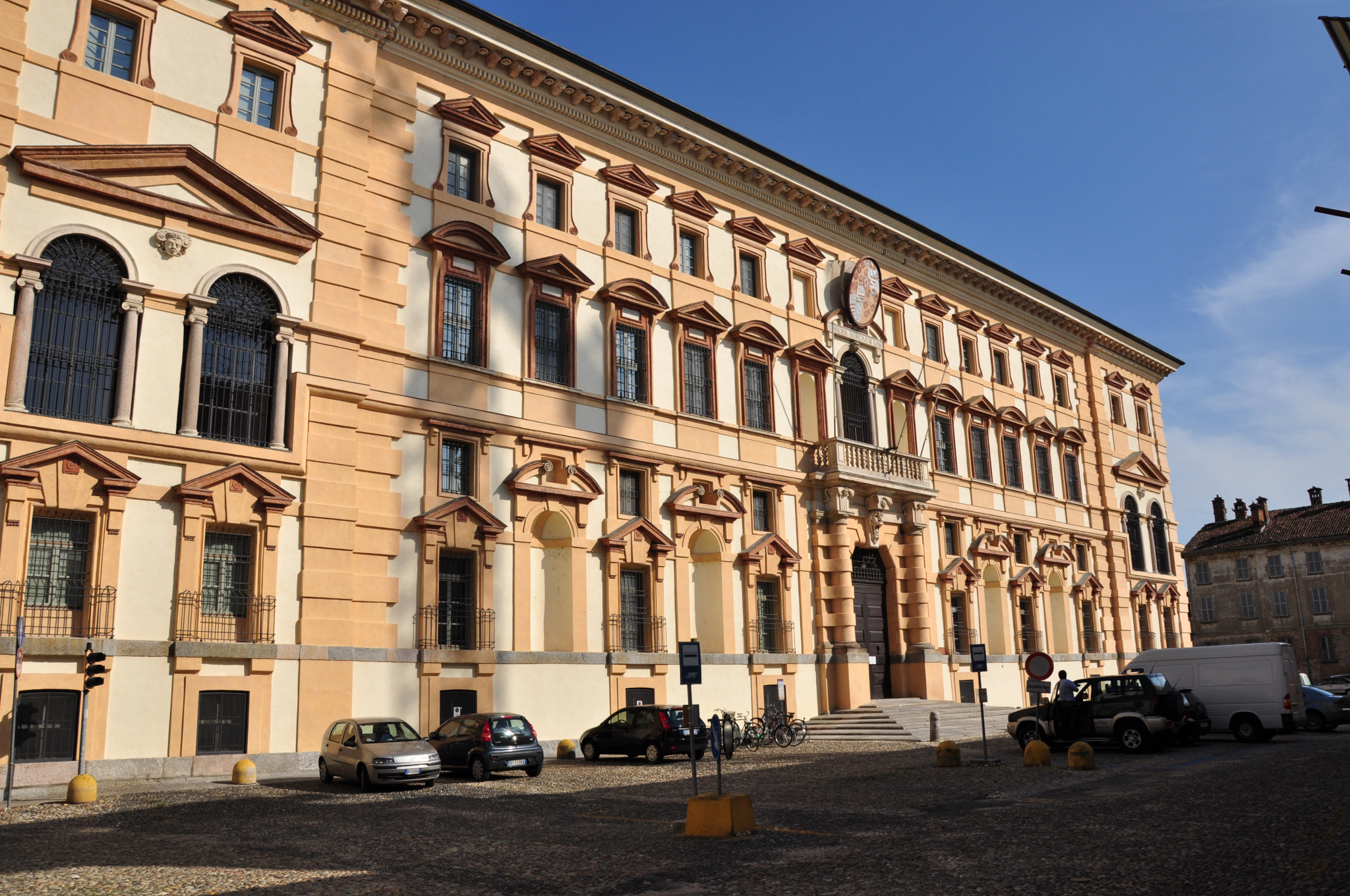 Almo Collegio Borromeo